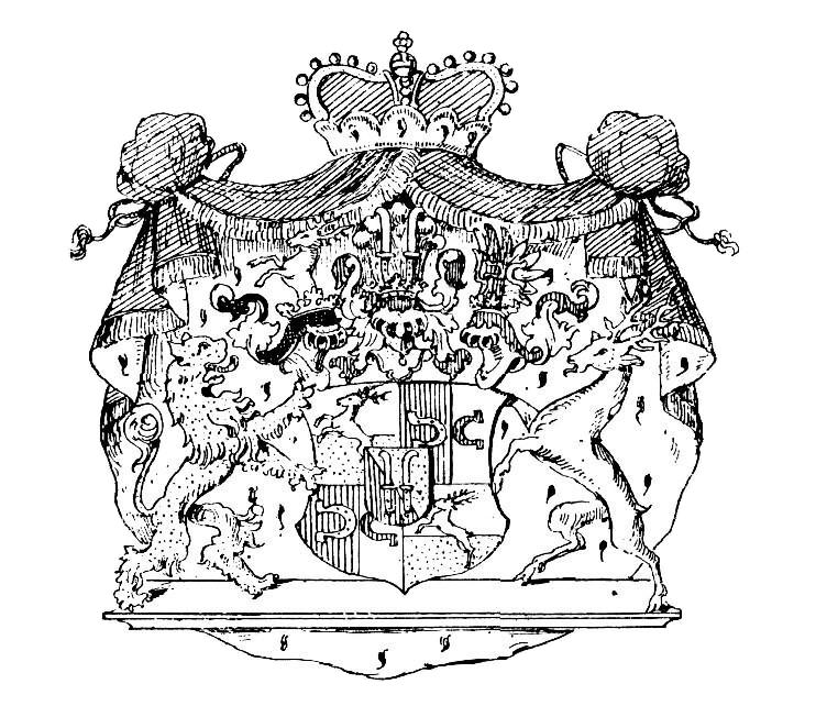 Wappen der Reichsfürsten von Dietrichstein zu Nikolsburg, Grafen von Proskau (Namens- und Wappenvereinigung der Fürsten von Dietrichstein (Herzschild) mit den Grafen von Proskau (Hauptschild) anlässlich Ererbung der (1782 wieder veräußerten) Herrschaft Proskau: 29. Juli 1769)